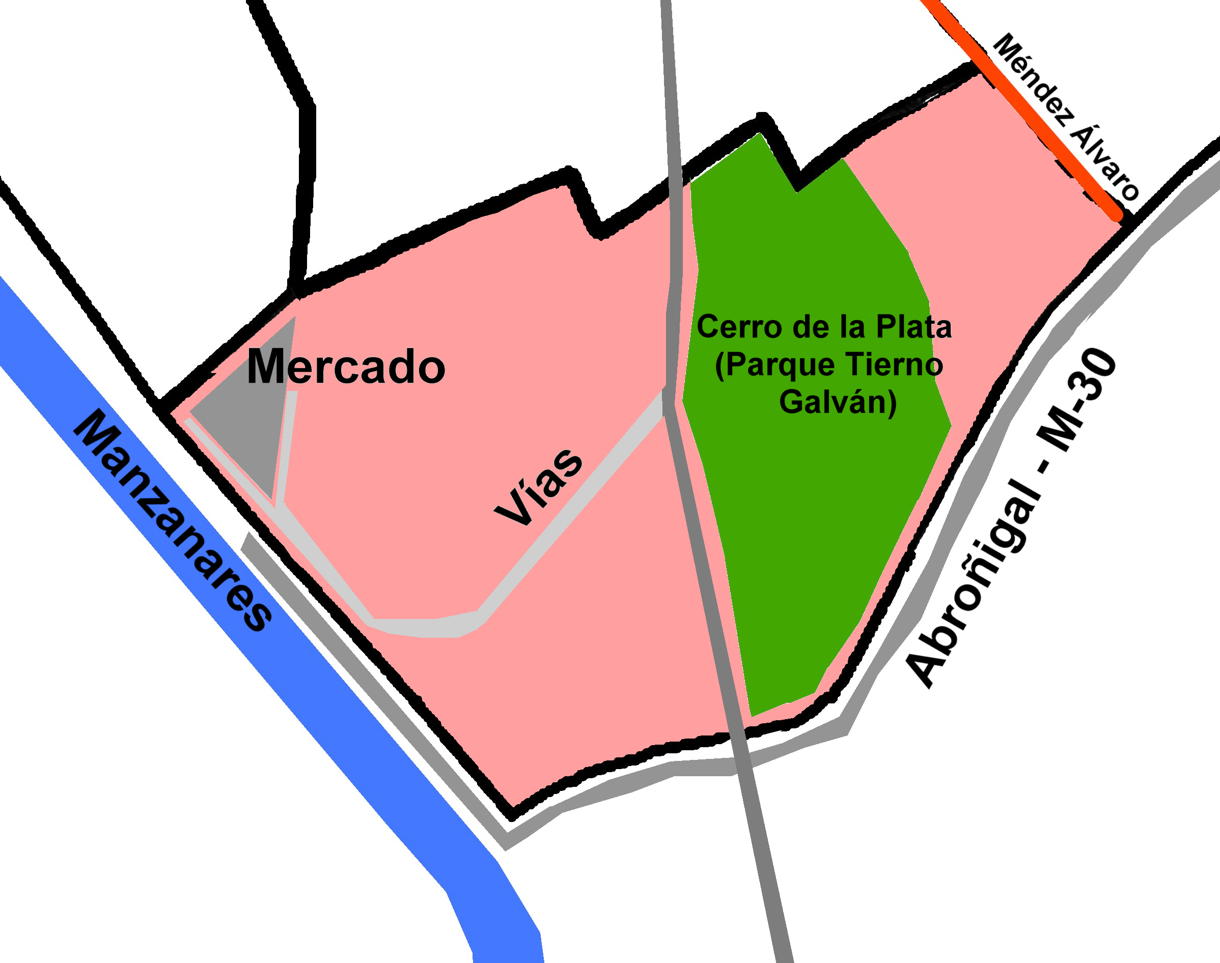 Esquema del barrio de Legazpi. Arganzuela. Madrid. España